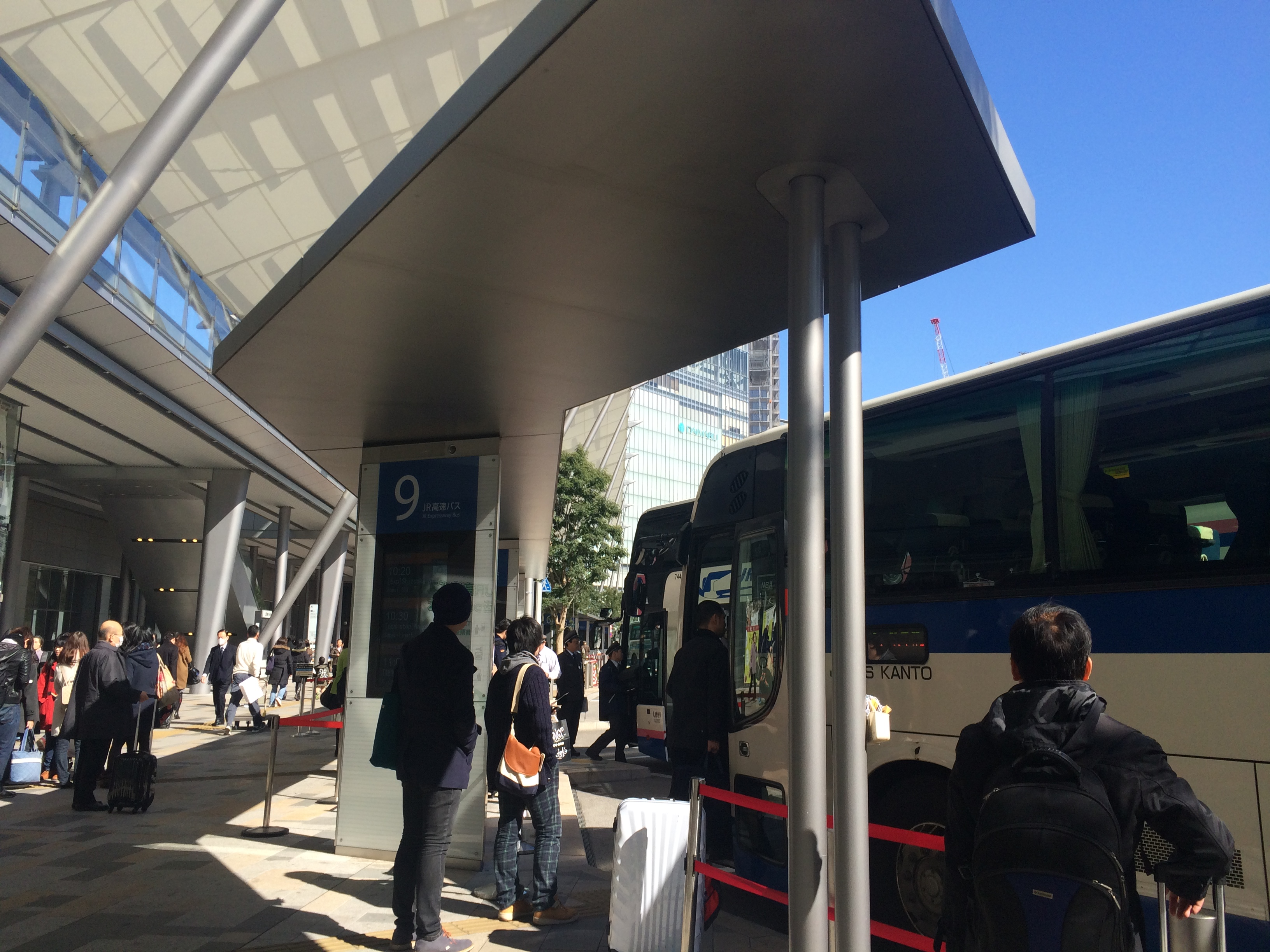 JR高速バス東京駅9番乗り場